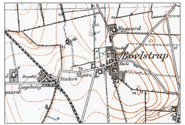 Bovlstrup i mellemkrigstiden